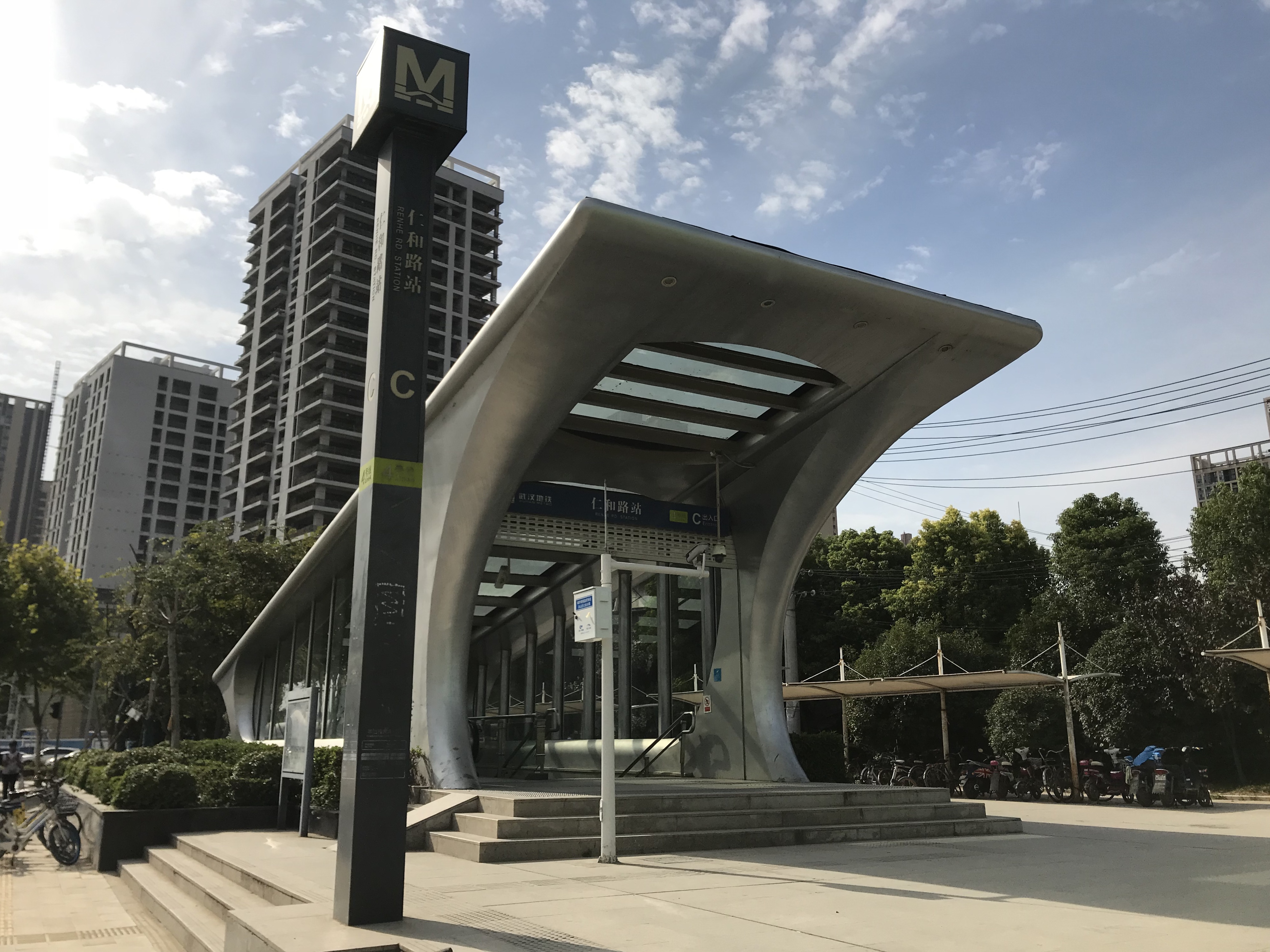 仁和路駅の3番出入り口